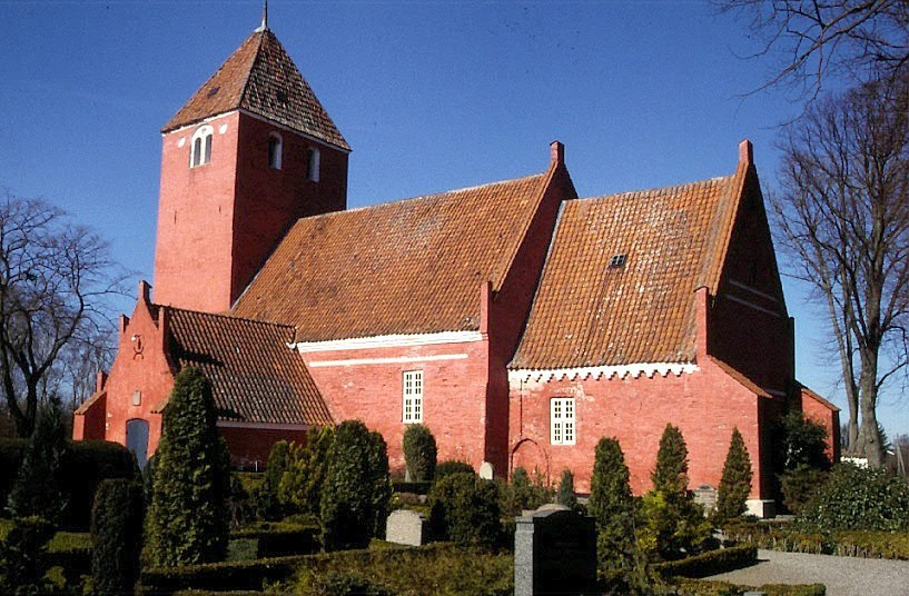 Vålse Kirke i Danmark. Vålse kirke